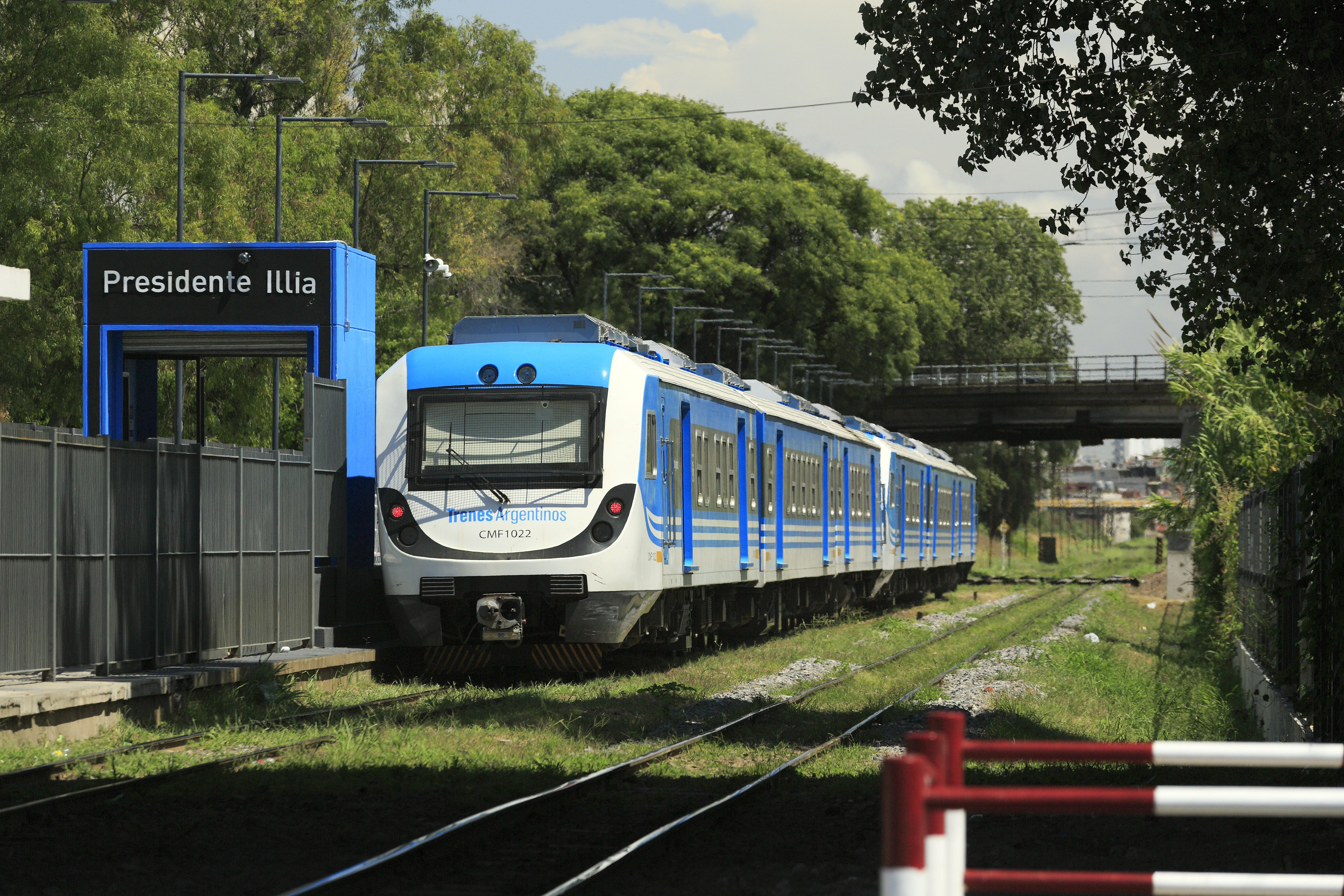 Línea Belgrano Sur, S-Bahn-Zug Buenos Aires – González Catán, Nachschuss. Die chinesischen Dreiwageneinheiten verkehren in der Regel als Doppeleinheit mit sechs Wagen und normalerweise auf der Stammstrecke nach González Catán. Das -F- in der Wagenbezeichnung steht für »furgón«, Gepäckwagen. In den so gekennzeichneten Wagen liegt hinter dem Führerstand ein Gepäckraum insbesondere für den Fahrradtransport. Warum man nicht alle Endwagen so ausgerüstet hat und wie sich ein Reisender verhalten soll, wenn er nicht vor einem Laderaum steht, weil eine Einheit umgekehrt gereiht läuft, bleibt das Geheimnis der Besteller.